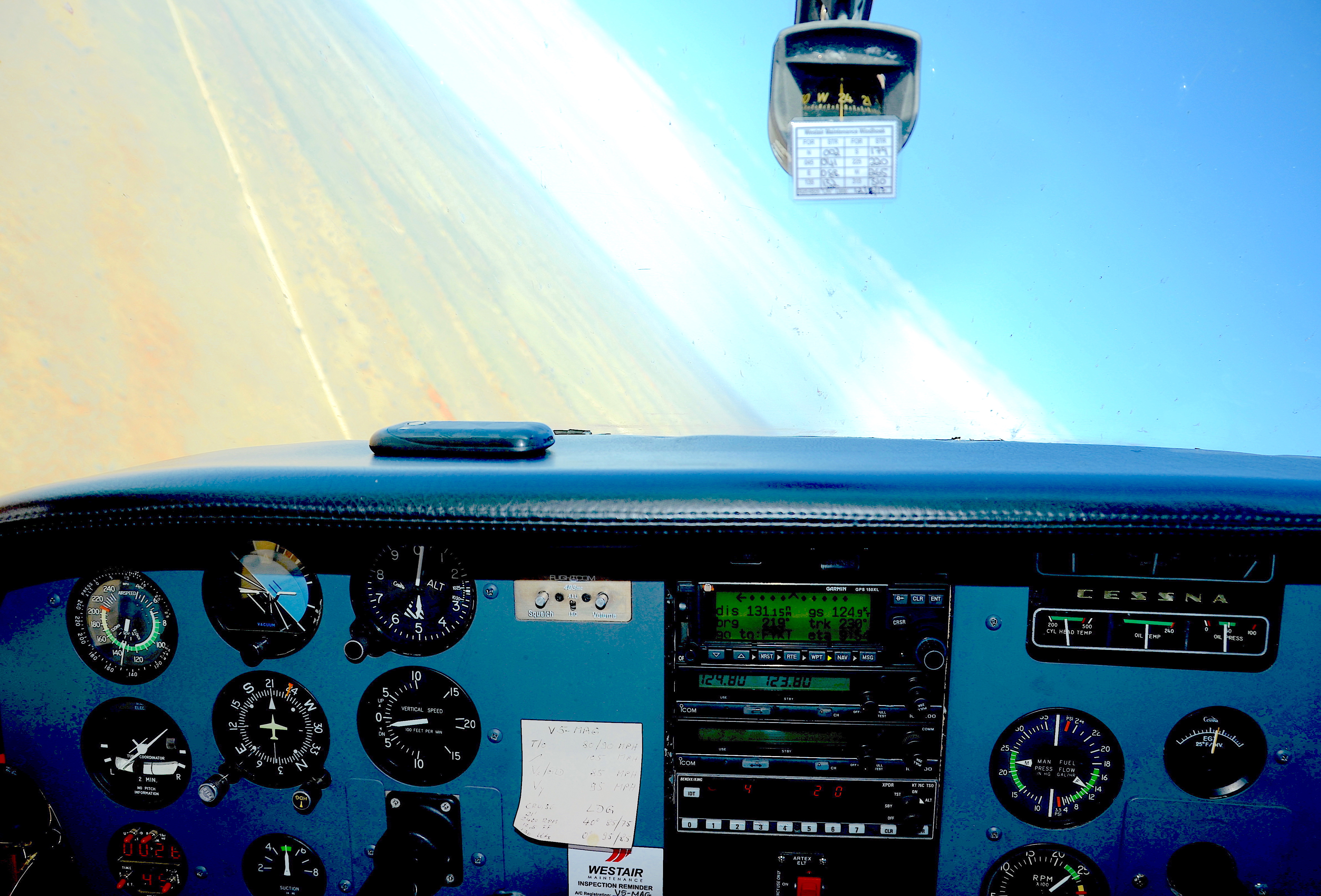 Cockpit einer Cessna 206 bei einer 40 Grad Neigung